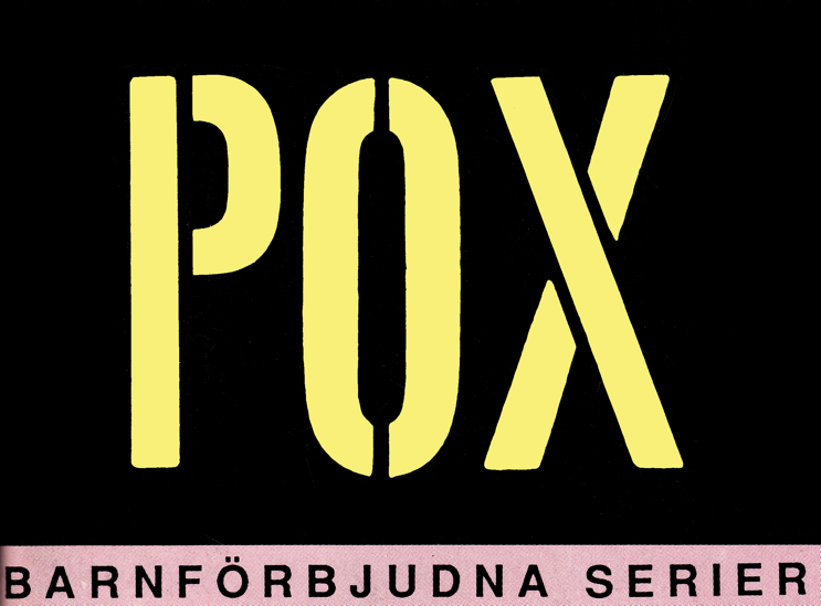 Omslagstitel till tidningen Pox. Denna logotyp/titel användes 1/1987–2/1989.